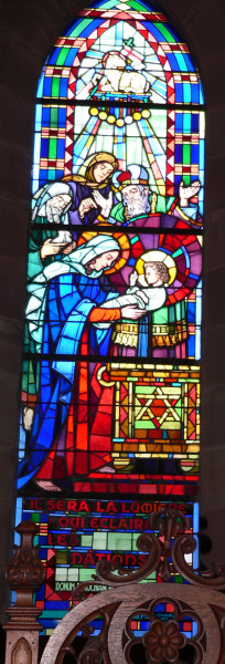 Goetzenbruck : vitrail réalisé par Antoine HEITZMANN